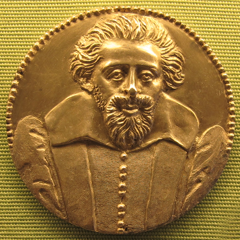 Ignoto, François Miron (1560-1609), XVII sec